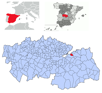 Ciruelo en la provincia de Toledo